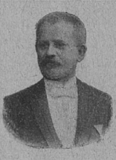 Josef Jirousek (1845-1917), rakouský a český podnikatel a politik